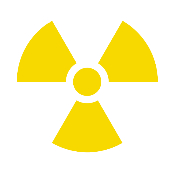 Símbolo de radiación. Zona de permanencia limitada. Según legislación española (que transpone las directivas europeas, que a su vez recoge las recomendaciones internacionales) Apéndice 4: Señalización de zonas, Real Decreto 1753/1987, Apéndice 4: Señalización de zonas, punto 3, Real Decreto 53/1992 y la legislación vigente en España Anexo IV: Señalización de zonas, punto 5 Real Decreto 783/2001.